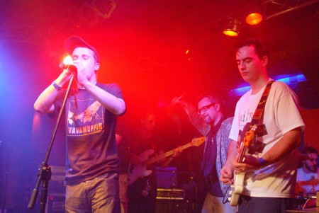 Vavamuffin; Pablopavo (left)